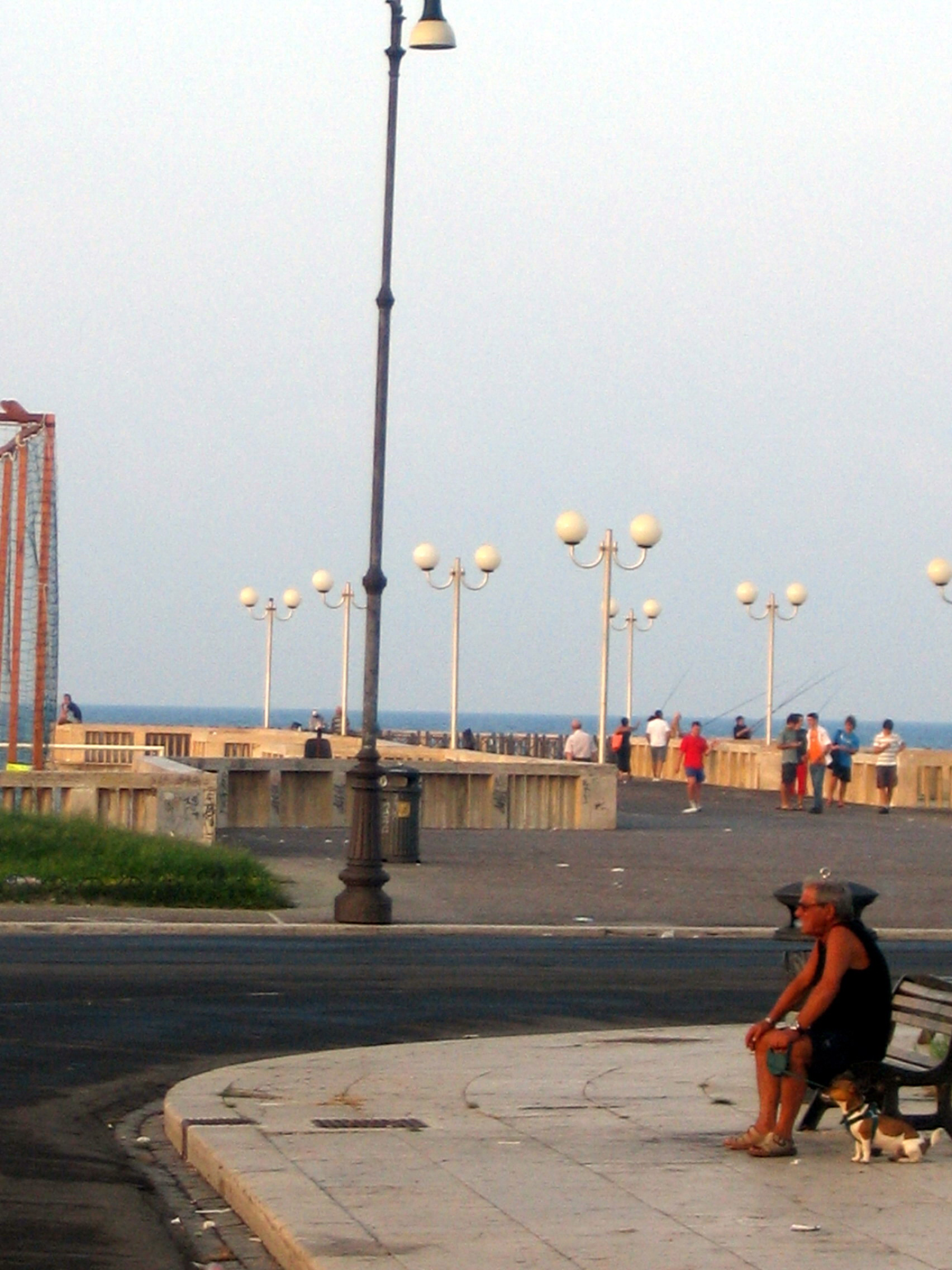 Ostia Lido, Roma, Italia